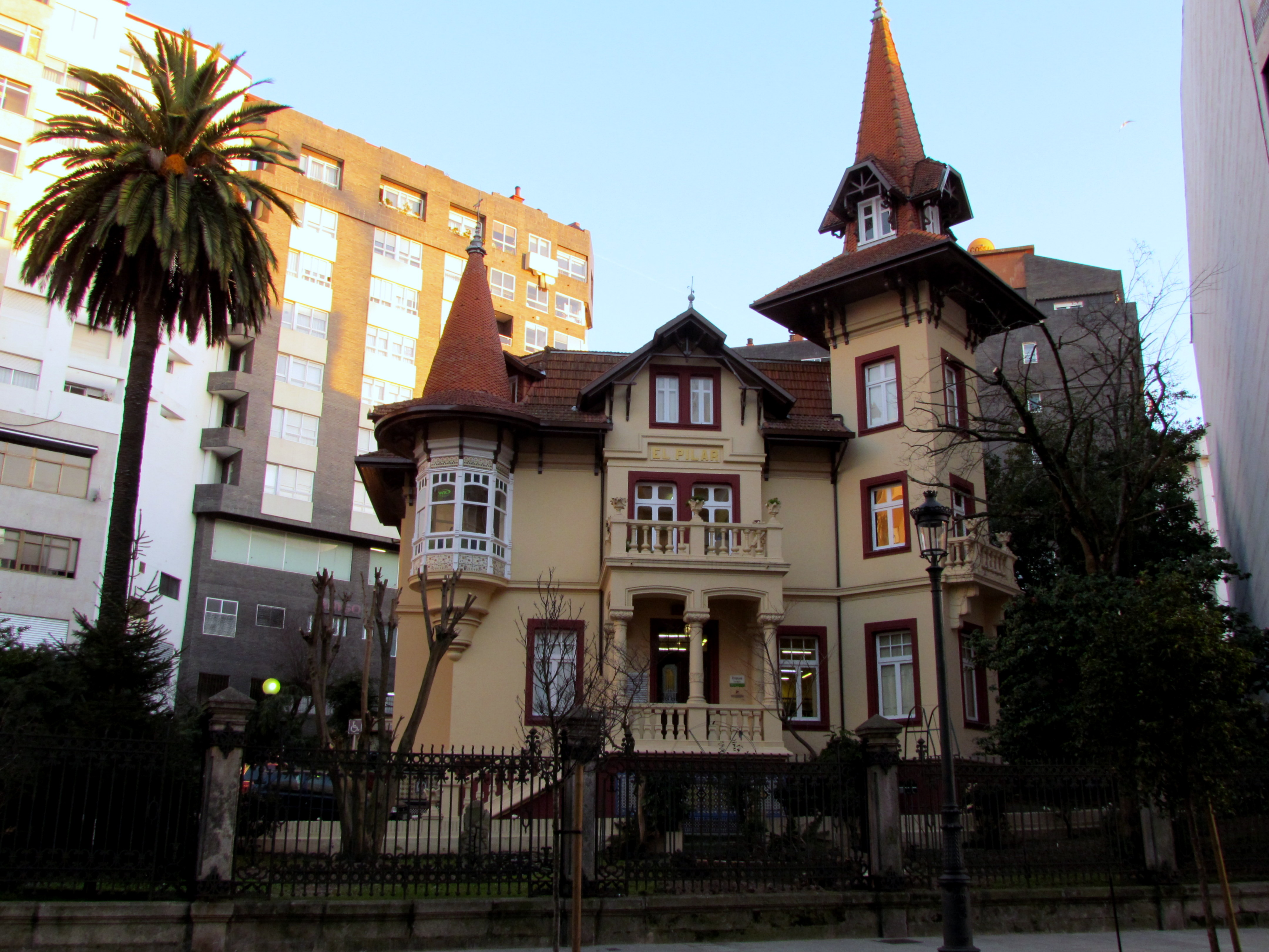 Casa de la Juventud